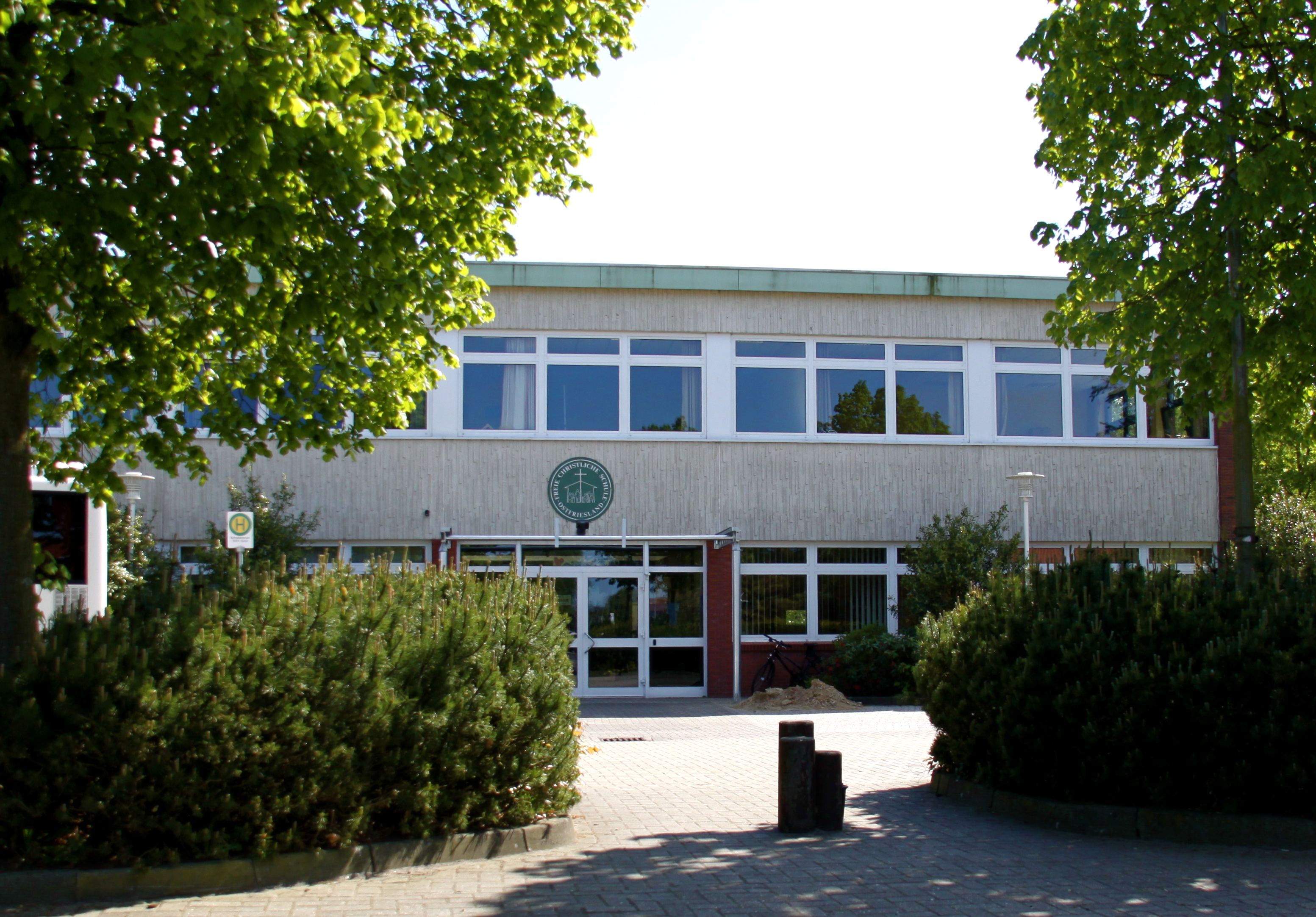 Freie Christliche Schule Ostfriesland